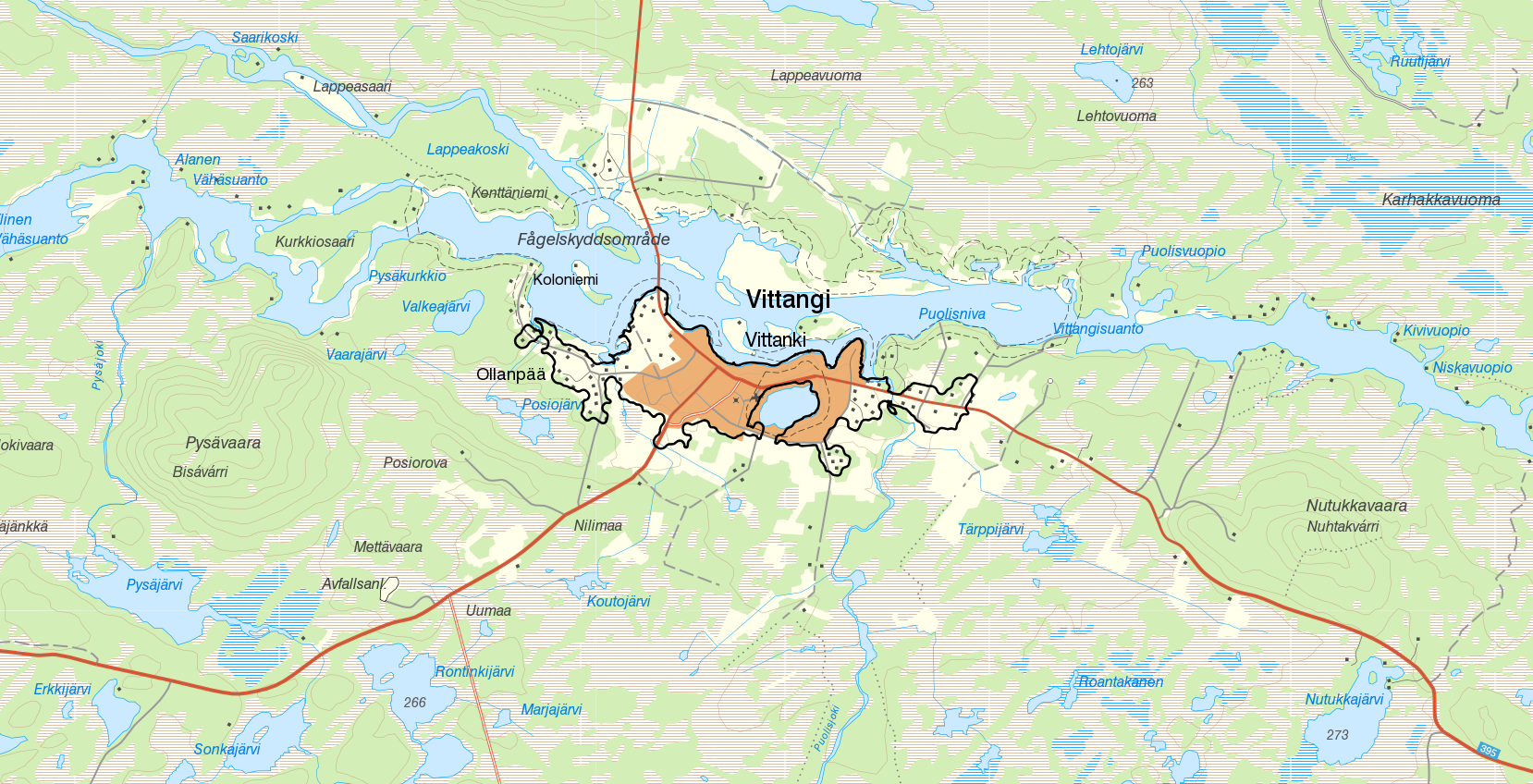 Tätorten Vittangi med gränserna från Statistiska centralbyråns tätortsavgränsning 2015. Bakgrundskarta från Lantmäteriet, skala 1:30 236.